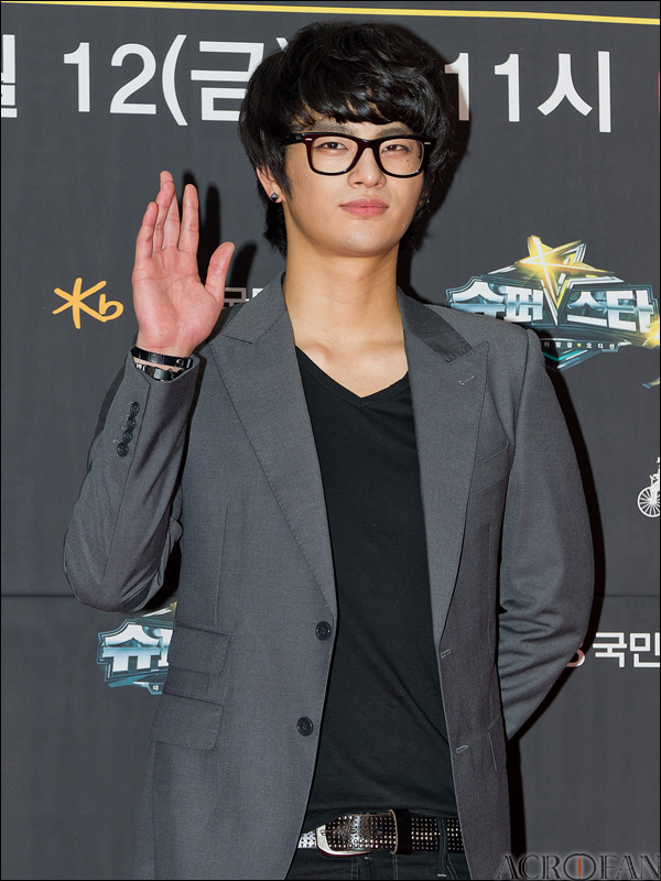 서인국. 슈퍼스타K 3 하이라이트 시사회 레드카펫 행사장에서